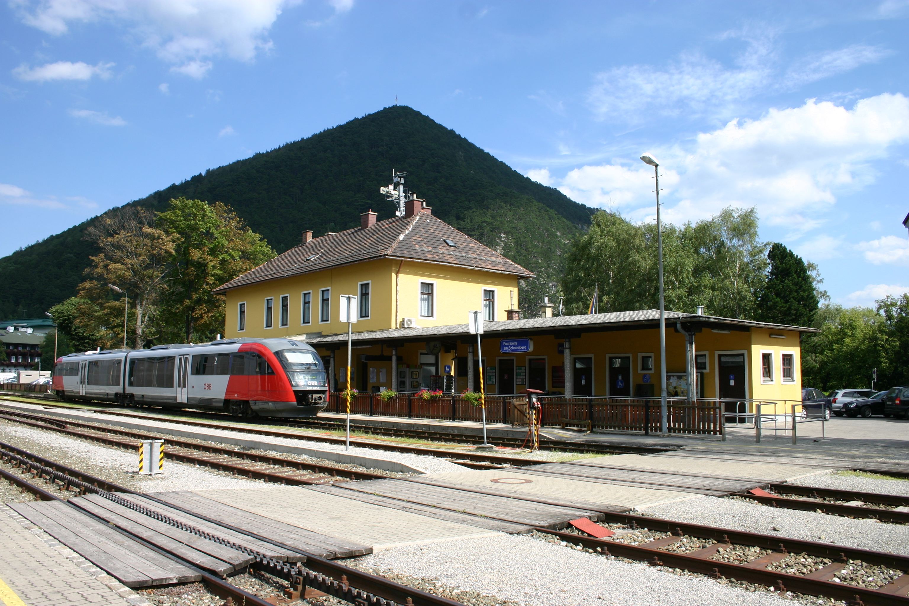 Bahnhof Puchberg am Schneeberg, Niederösterreich, Österreich.